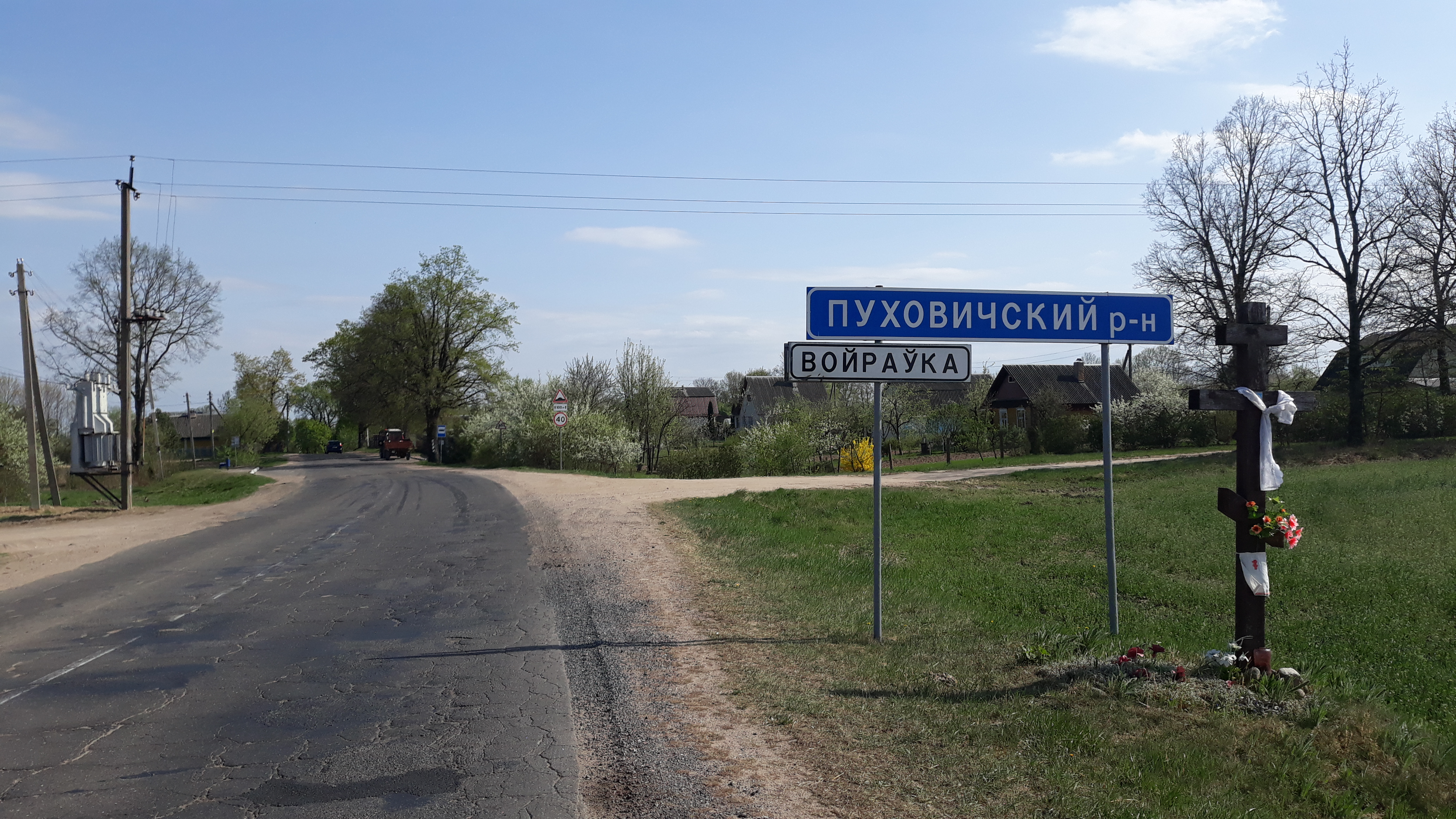 Краявід вёскі